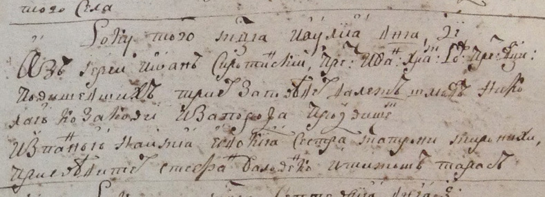 Метричний запис Козака Никифора